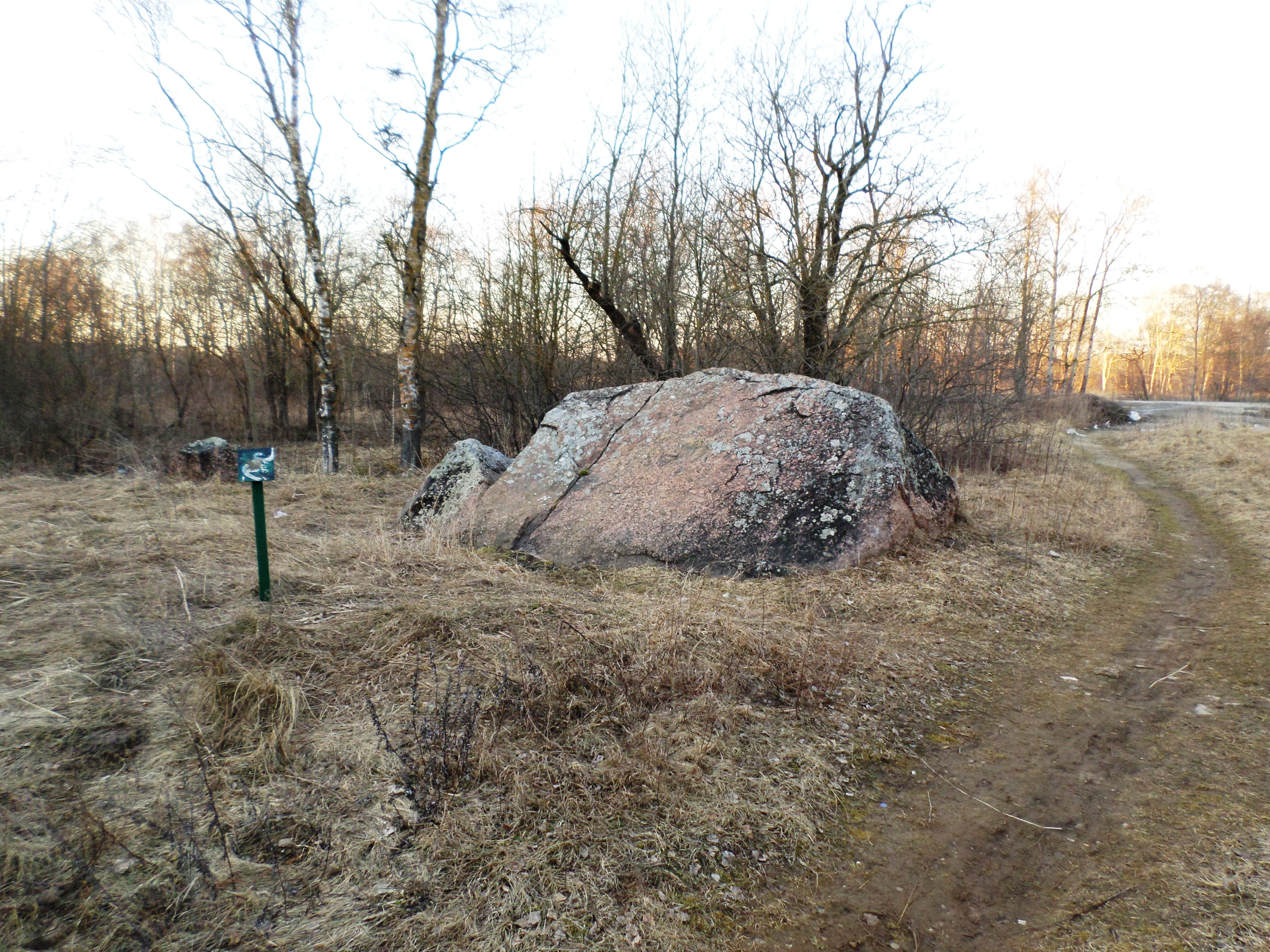 Iru kuuskivi